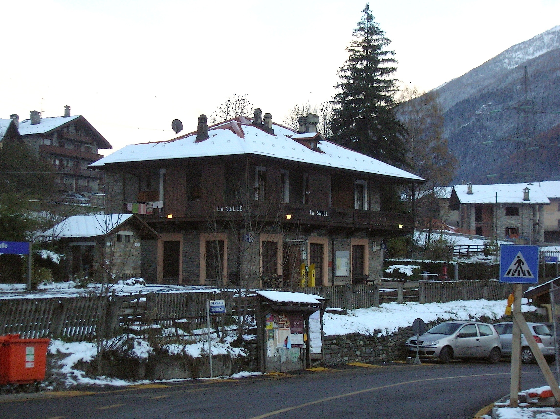 Stazione di La Salle, Valle d'Aosta, Italia.